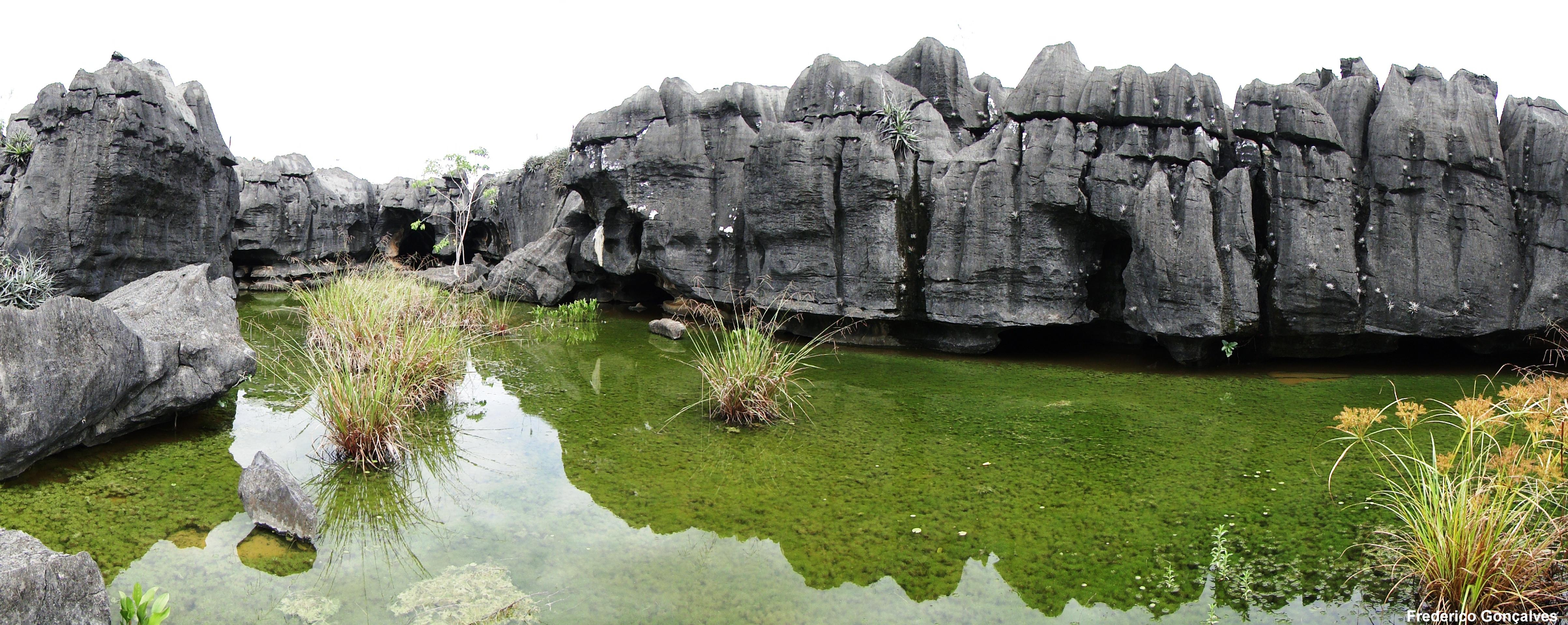 Lago sazonal formado no piso de um polje situado no topo de um platô na cidade de Jequitaí-MG. A sua área mede aproximadamente 45 m de comprimento por 15 m de largura. Vista para o norte.